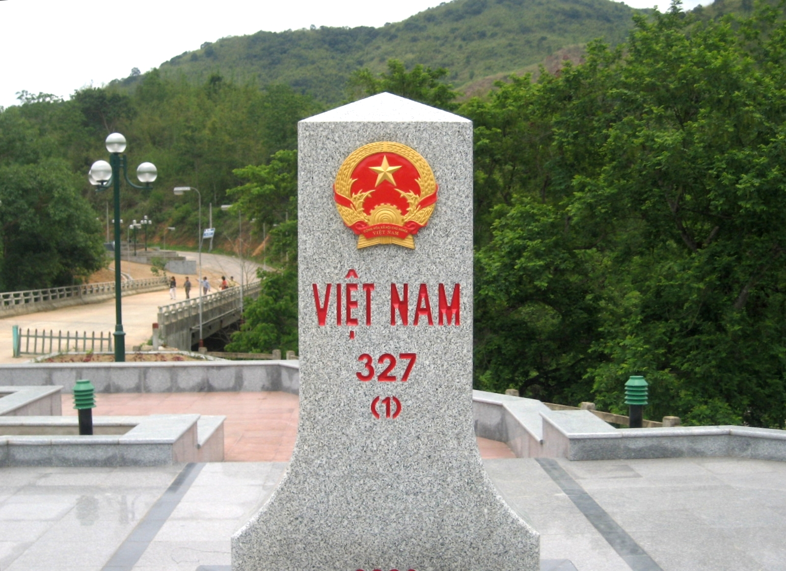 Cột mốc biên giới 327 phía Việt Nam ở cửa khẩu Na Mèo, huyện Quan Sơn, tỉnh Thanh Hóa, Việt Nam. Đường ngang chính giữa cây cầu bắc qua con suối là đường biên giới Việt - Lào